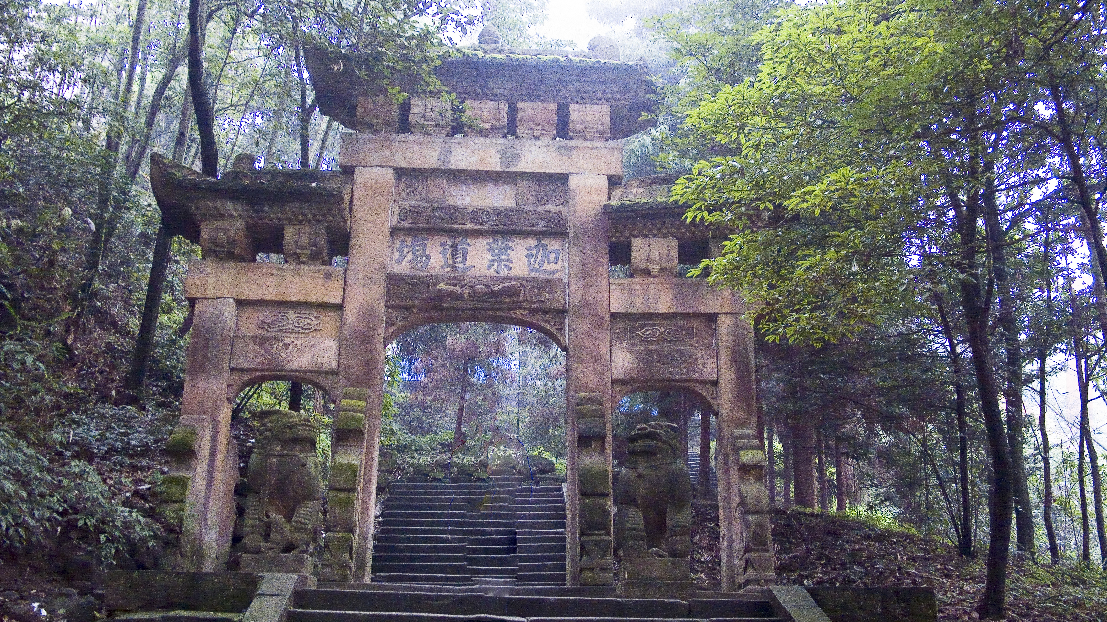 縉雲山牌坊